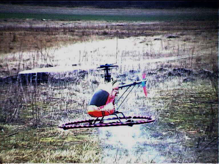 Ein selbstgebautes Trainingslandegstell für einen Modellhubschrauber (Reifenversion)